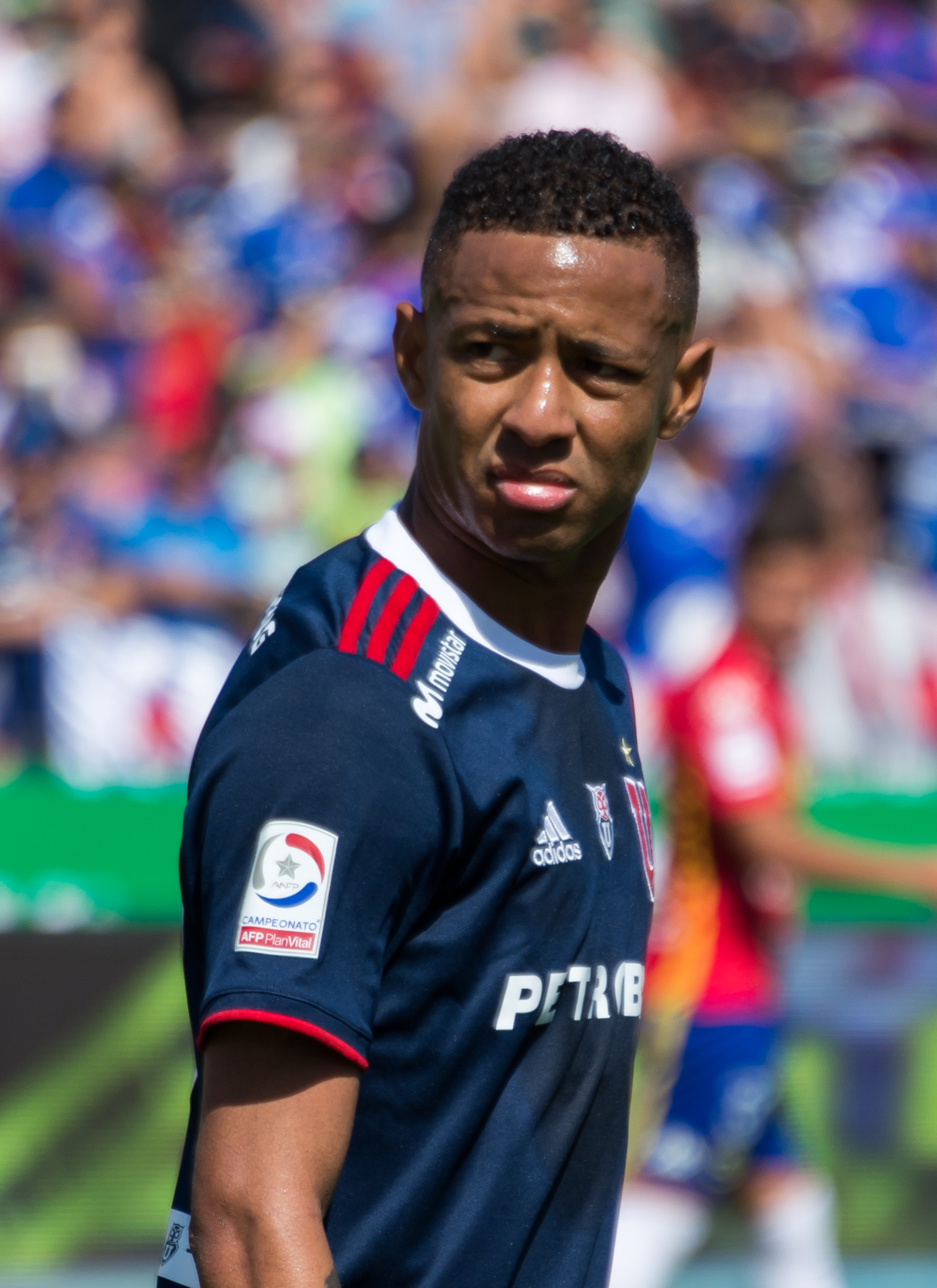 Gabriel Torres, Universidad de Chile v Unión Española, Estadio Nacional Julio Martínez Prádanos, Ñuñoa, Santiago, Región Metropolitana, Chile.